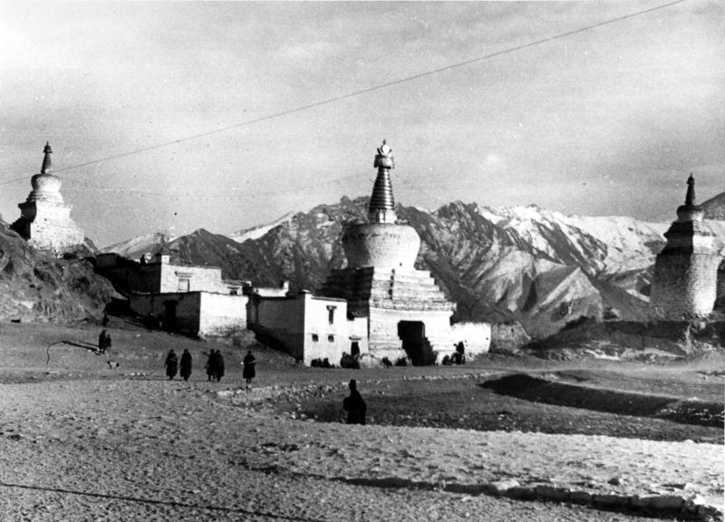 Lhasa, Eingangstschorten